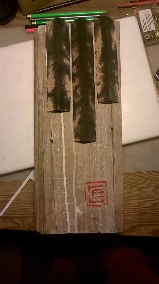 Haiku (oryginał), 2018, 35x15 cm (farba akrylowa, bejca, deska podłogowa, elementy skrzynek po warzywach, szablon z papieru wysciełającego karton bananów w z Ekwadoru)